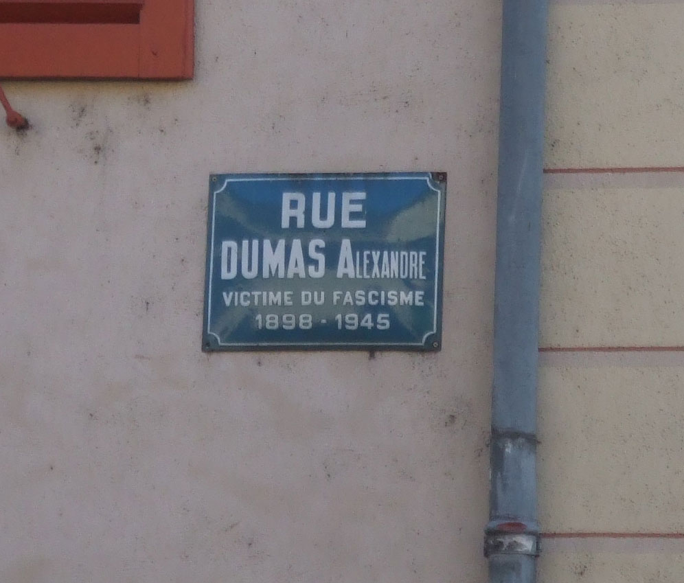 plaque de rue à Pont-de-Beauvoisin (Isère) dédiée à Dumas Alexandre, résistant victime du fascisme